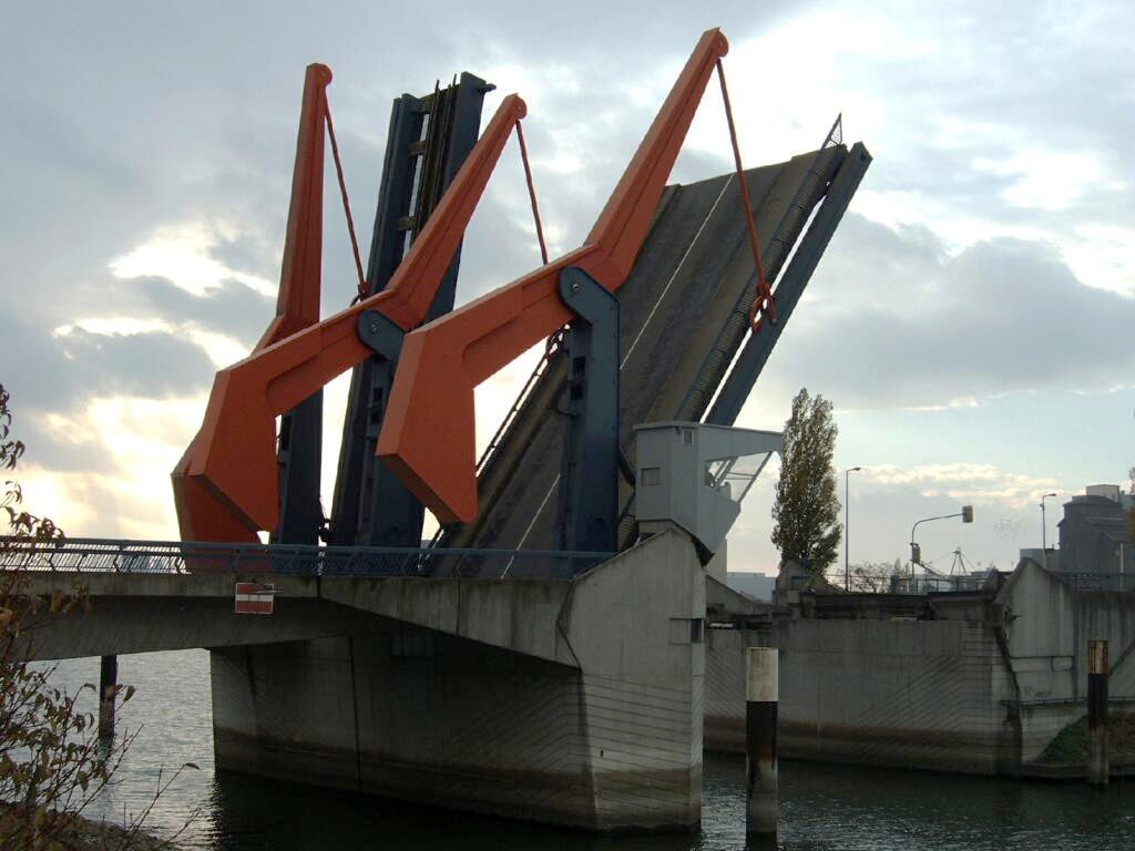 Diffenébrücke in Mannheim